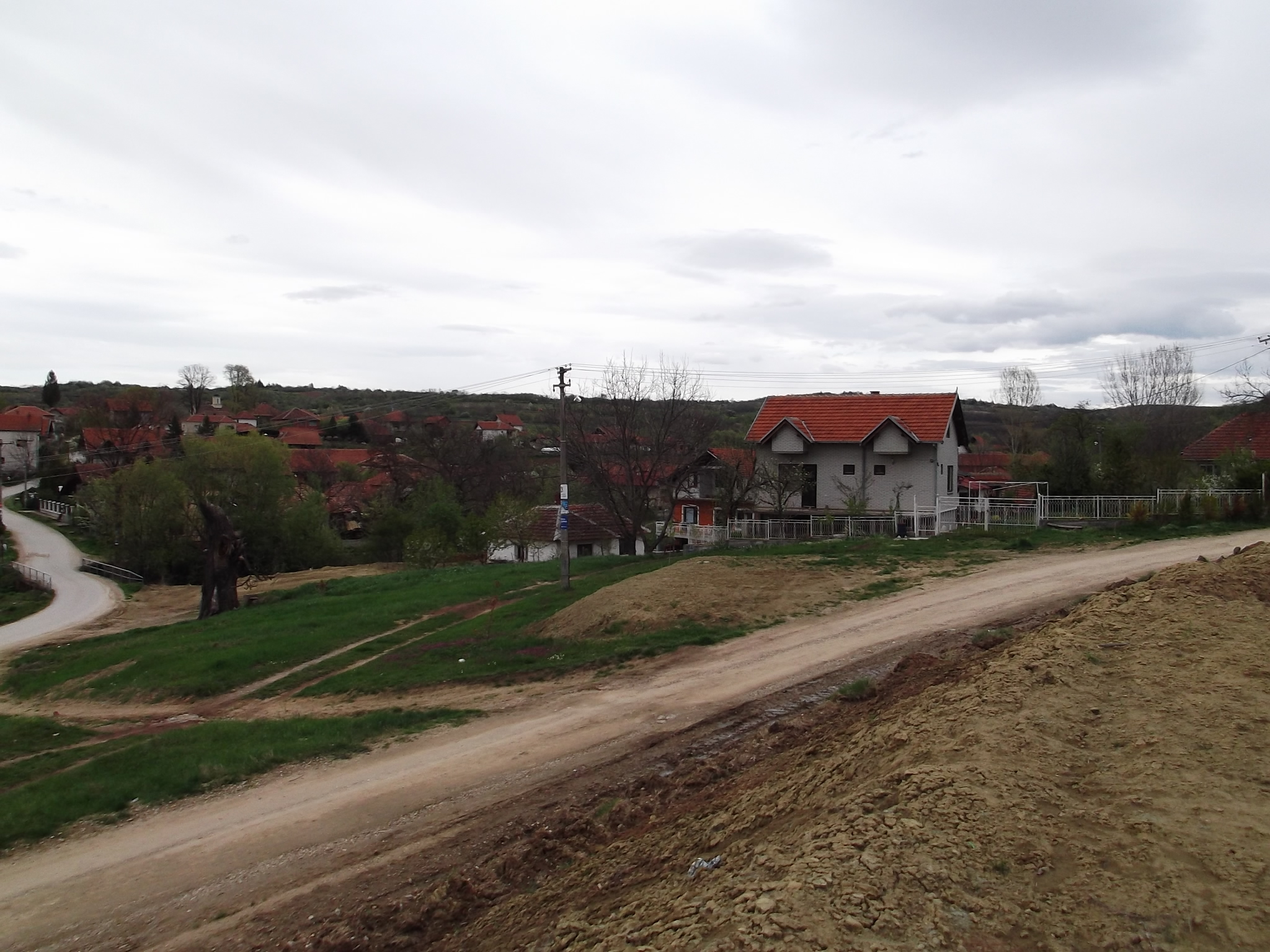 Ćurlina